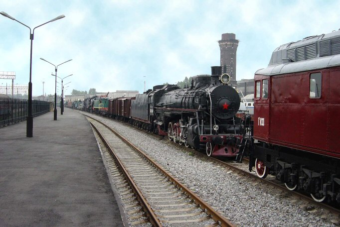 Spoorwegmuseum (vm. Warschaustation) te St. Petersburg. Eigen foto, augustus 2002